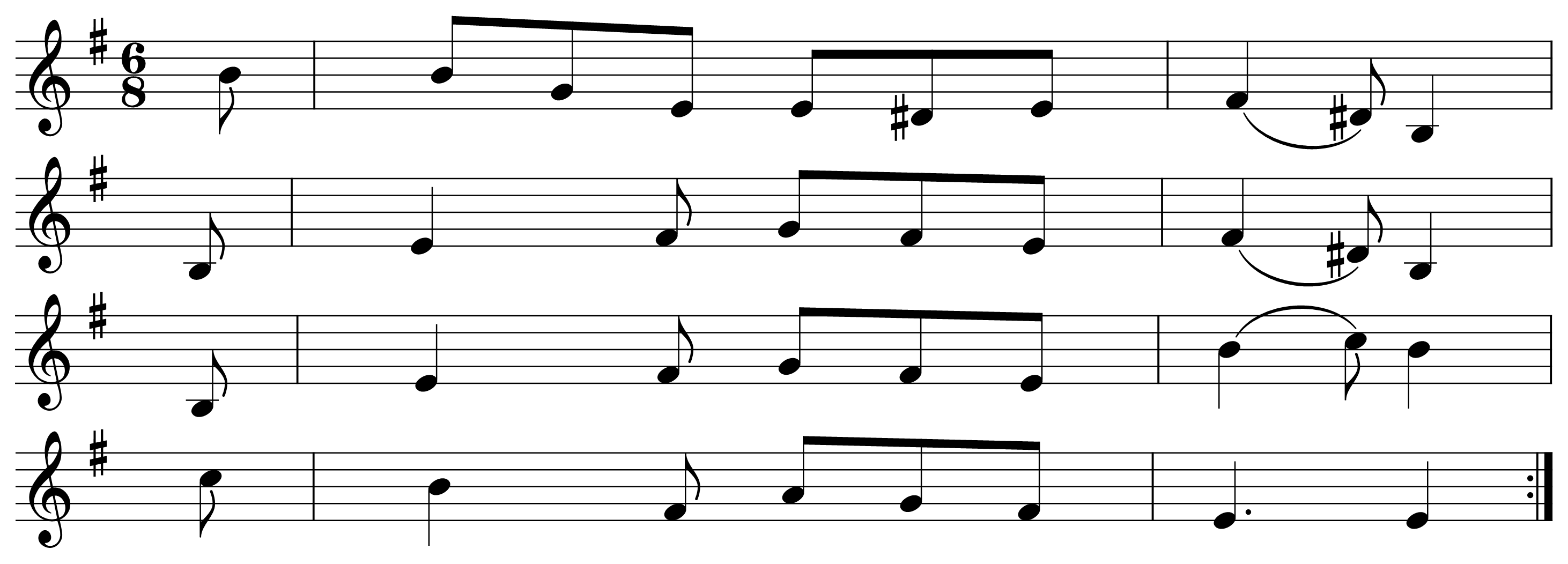 Natal de Linhares. A versão Natal de Envendos foi recolhida por Francisco Serrano nos "Romances e Canções Populares da Minha Terra" em 1921.